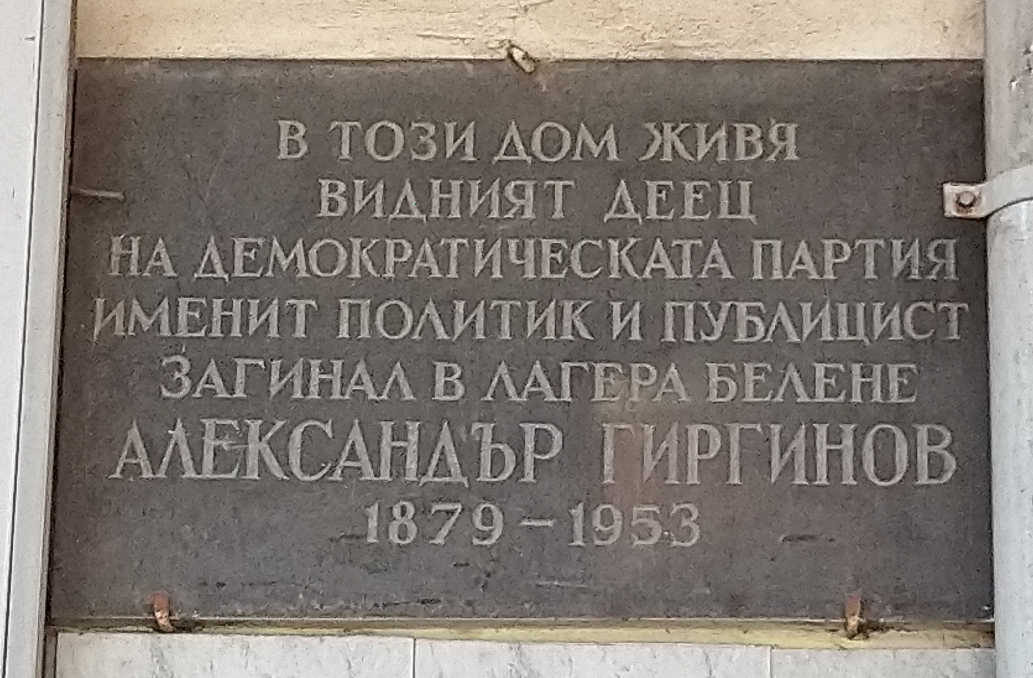 Паметна плоча на Александър Гиргинов, ул. Раковски 120, София